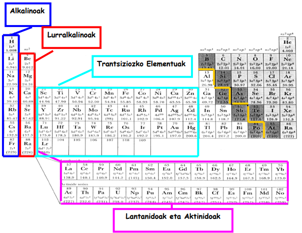 Metalak taula periodikoan